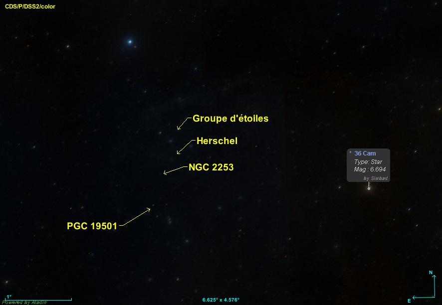 Image créée à l'aide du logiciel Aladin Sky Atlas du Centre de Données astronomiques de Strasbourg et des données publiques en format FIT de DSS (Digitized Sky Survey).